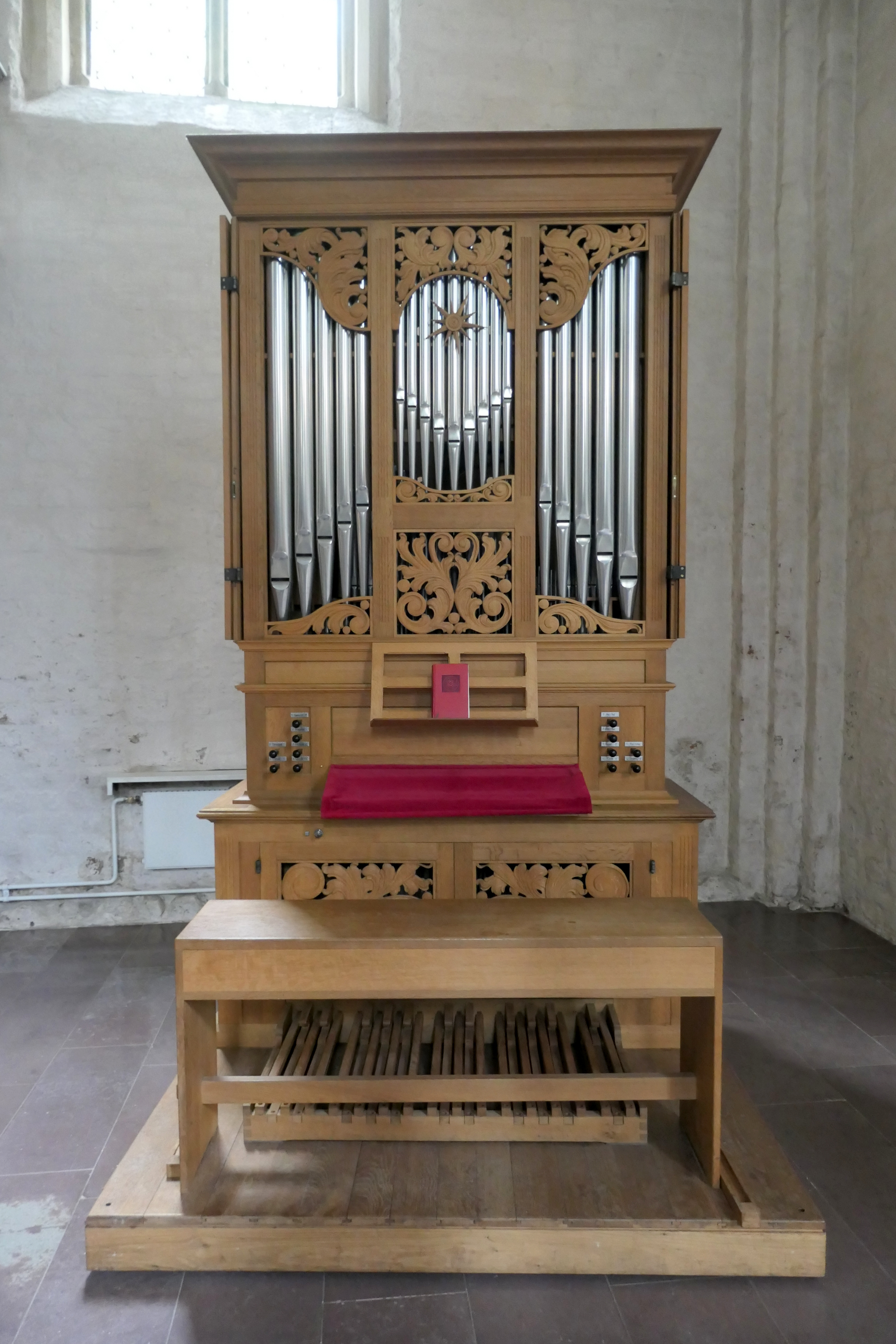 Orgel der Marienkirche Rendsburg, Kreis Rendsburg-Eckernförde, Schleswig-Holstein, Deutschland